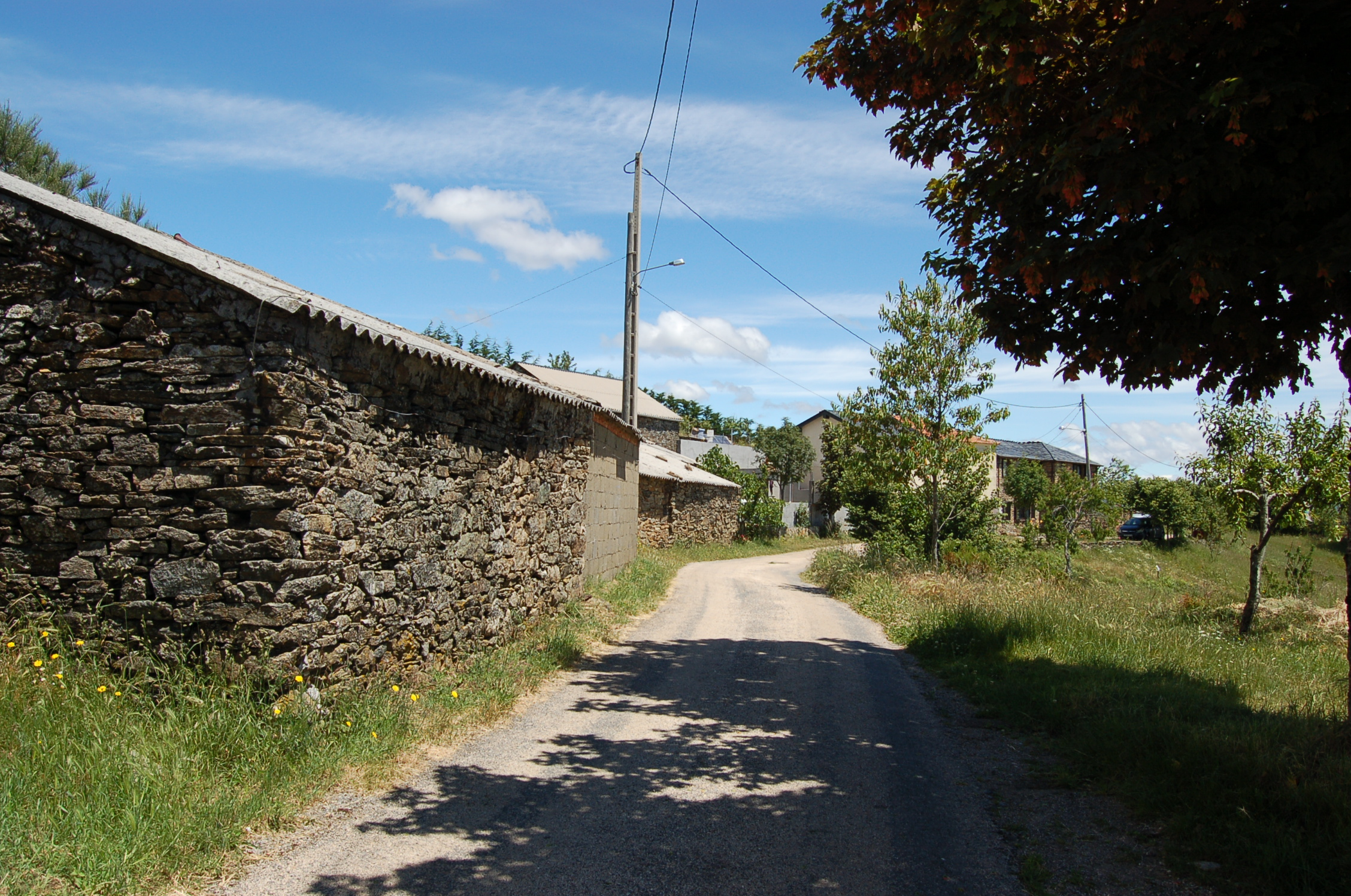 vista da aldea da Venda do Bolaño desde o oeste